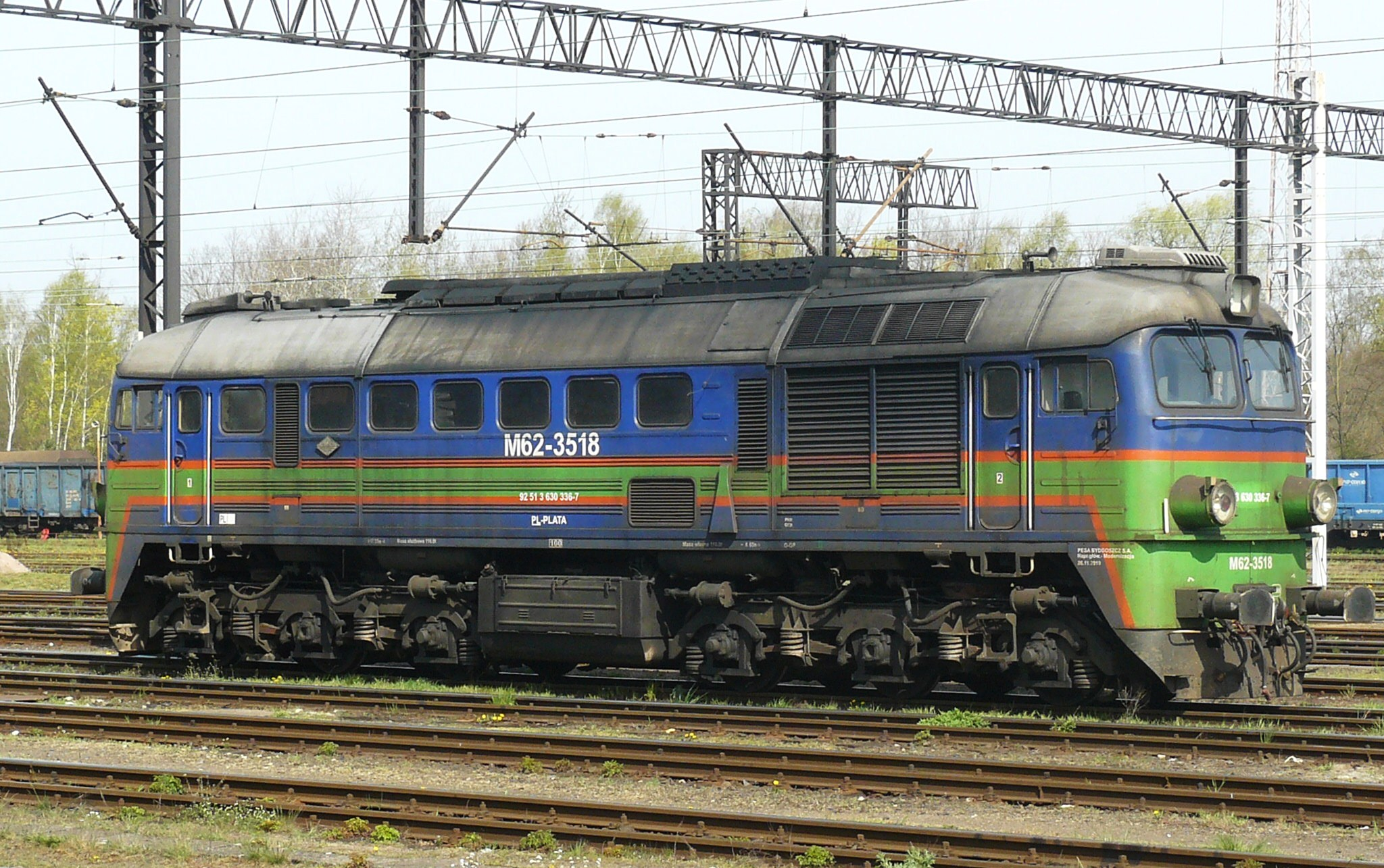 Lokomotywa spalinowa M62-3518 w malowaniu przewoźnika Lokomotiv na stacji kolejowej w Węglińcu.